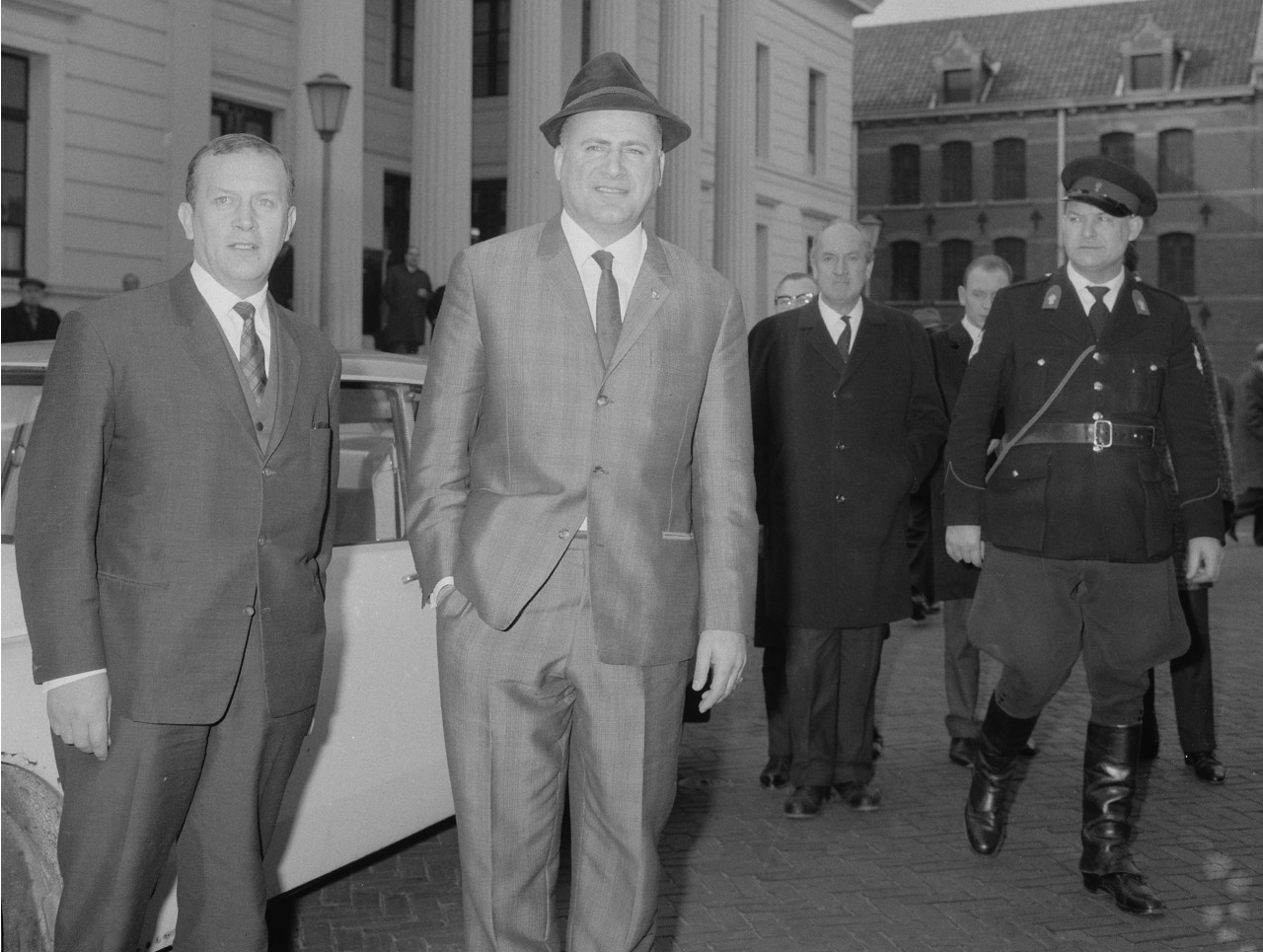 Leo Horn voor politierechter, na de rechtszitting deelt Leo Horn handtekeningen uit.